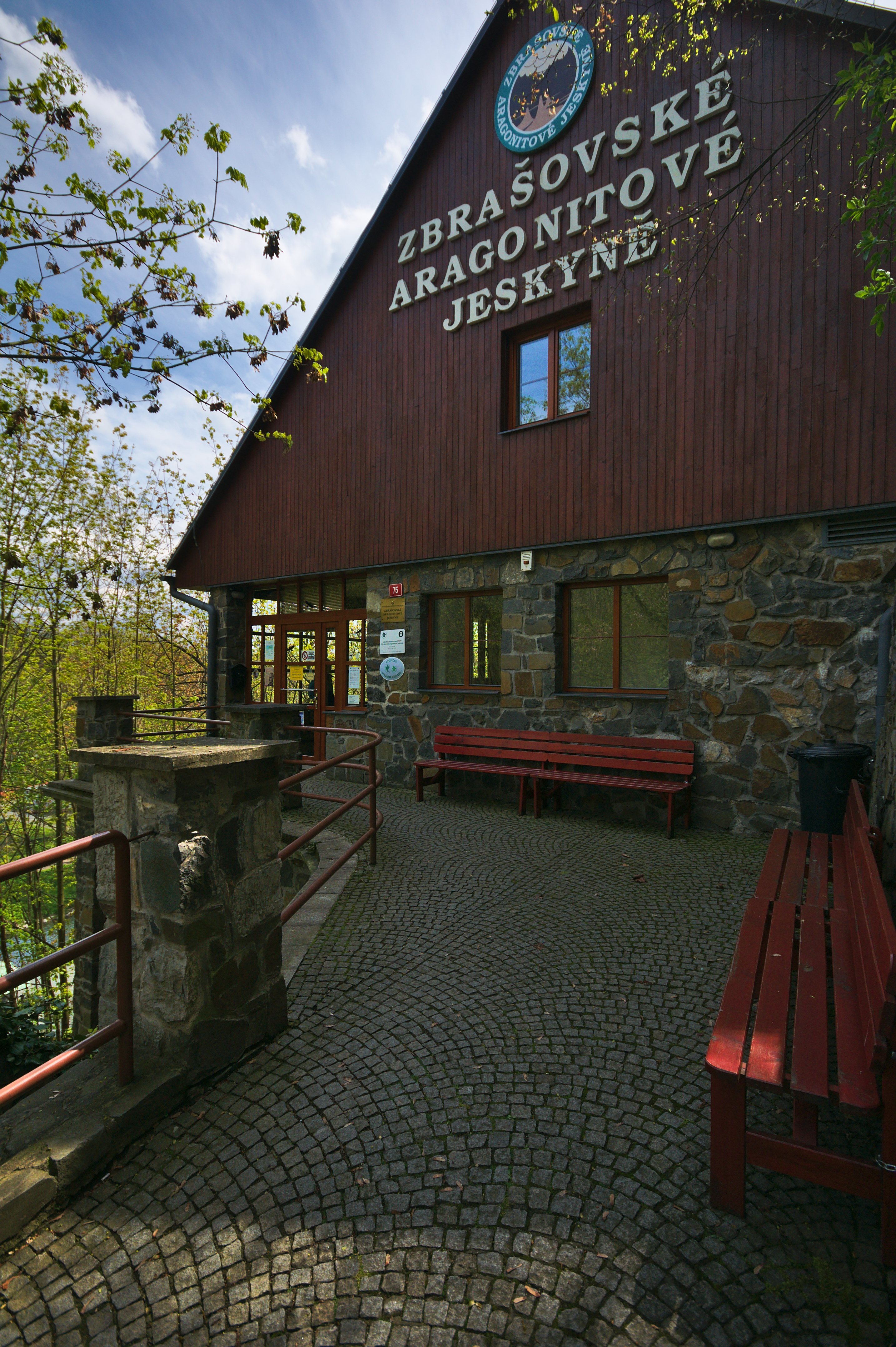 Vstup do jeskyní, národní přírodní památka Zbrašovské aragonitové jeskyně, okres Přerov